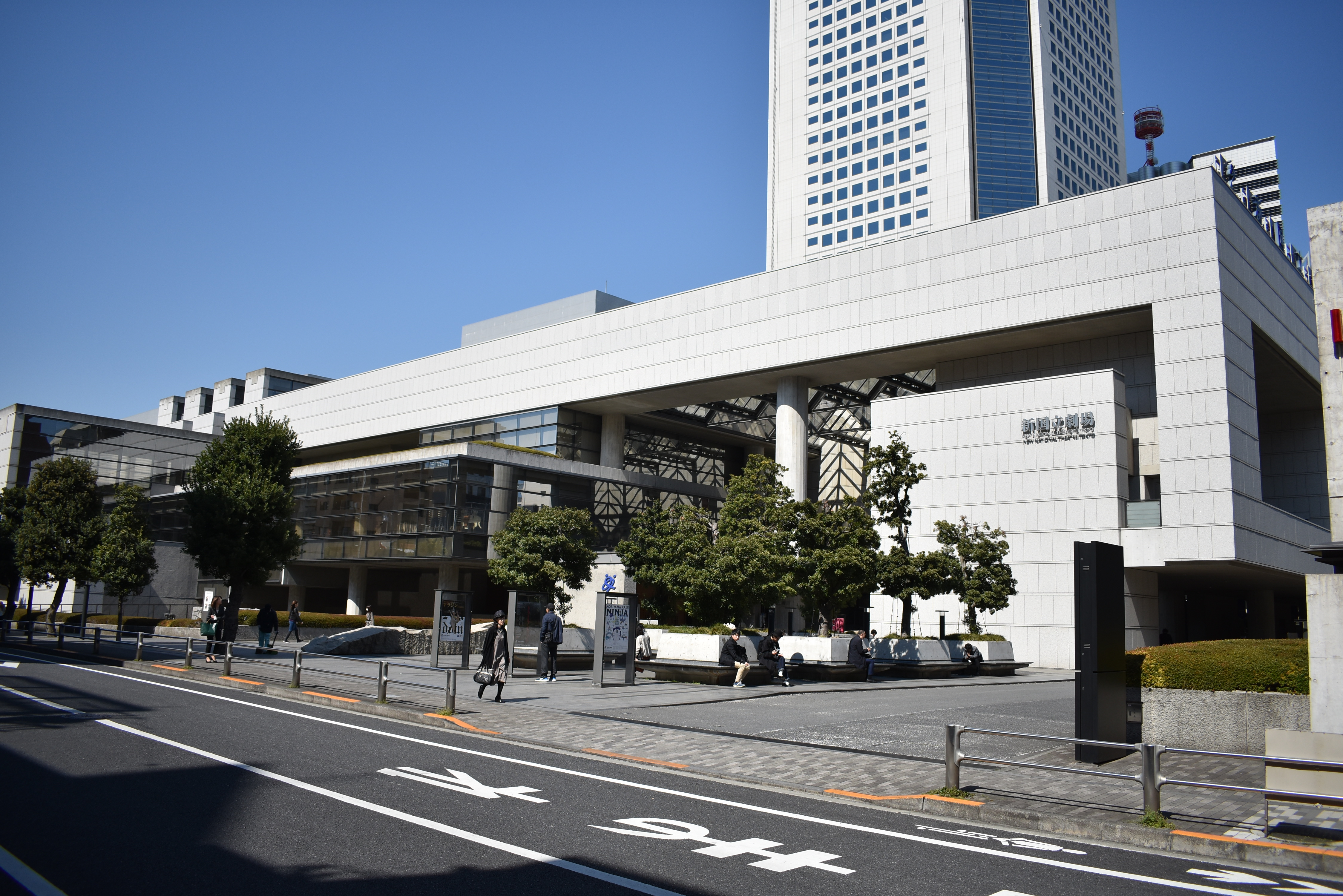 新国立劇場 Nikon D3400